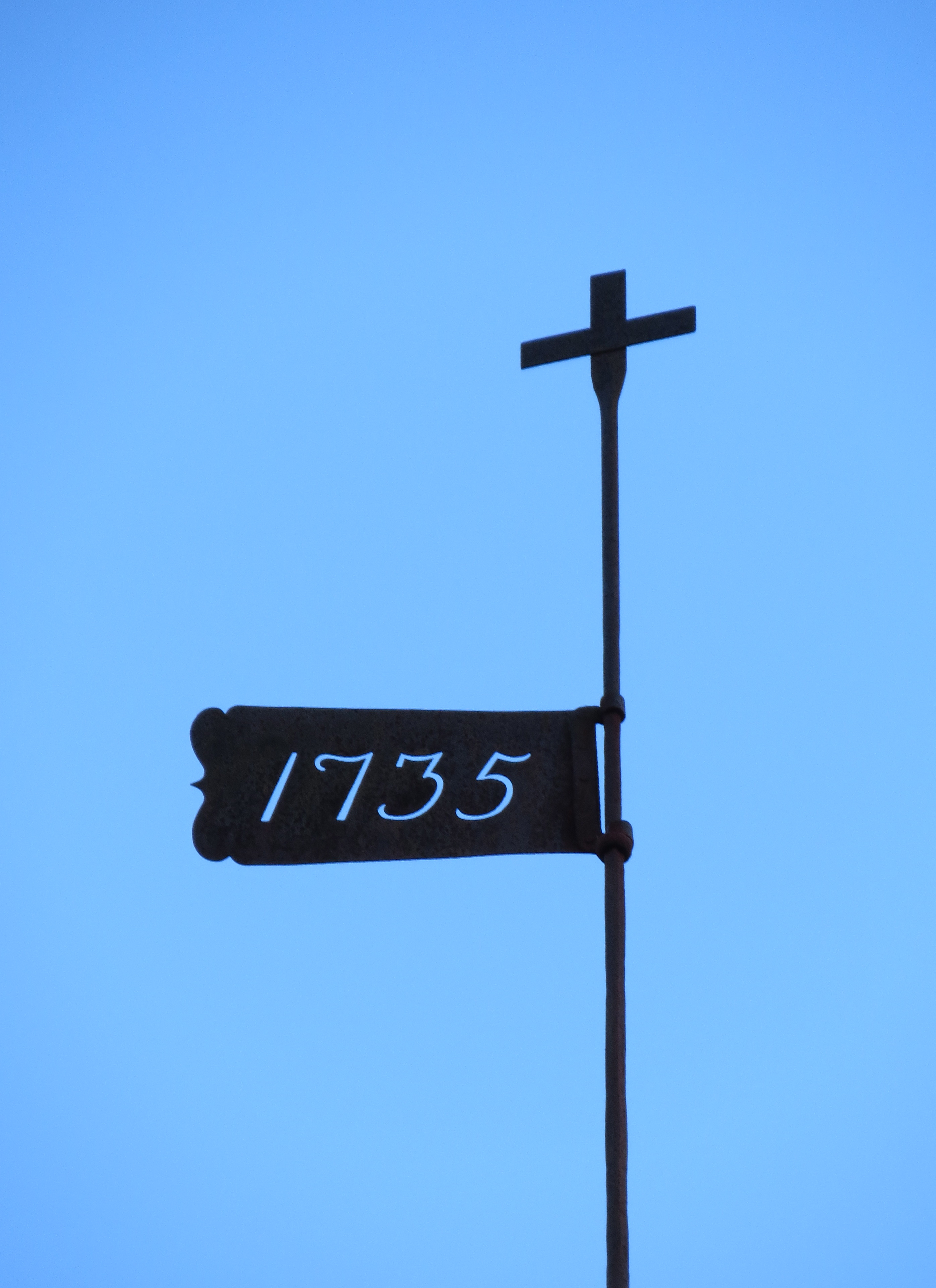 Tårnspir med årstallet 1735, Helgen Kirke, Nome, Telemark